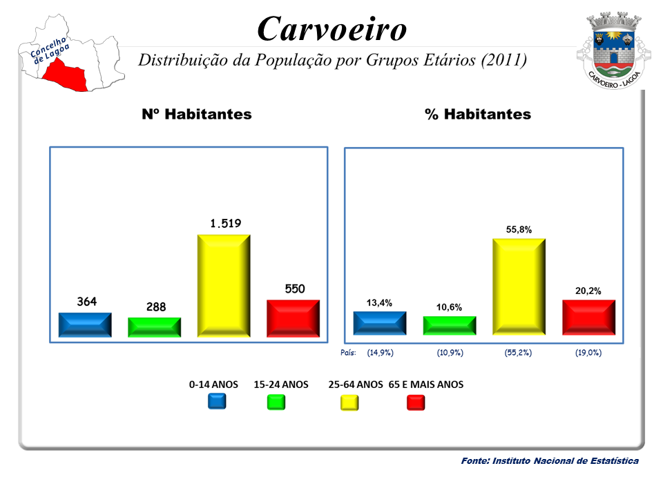 Censos 1864/2011